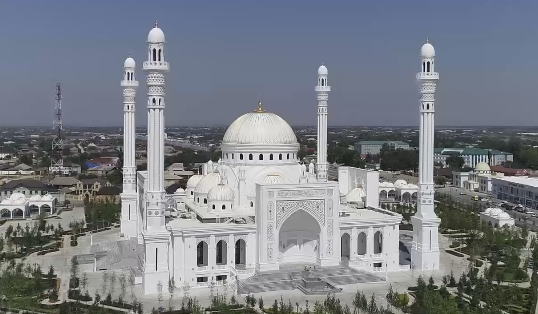 Гордость мусульман - мечеть имени Рамзана Кадырова в Шали